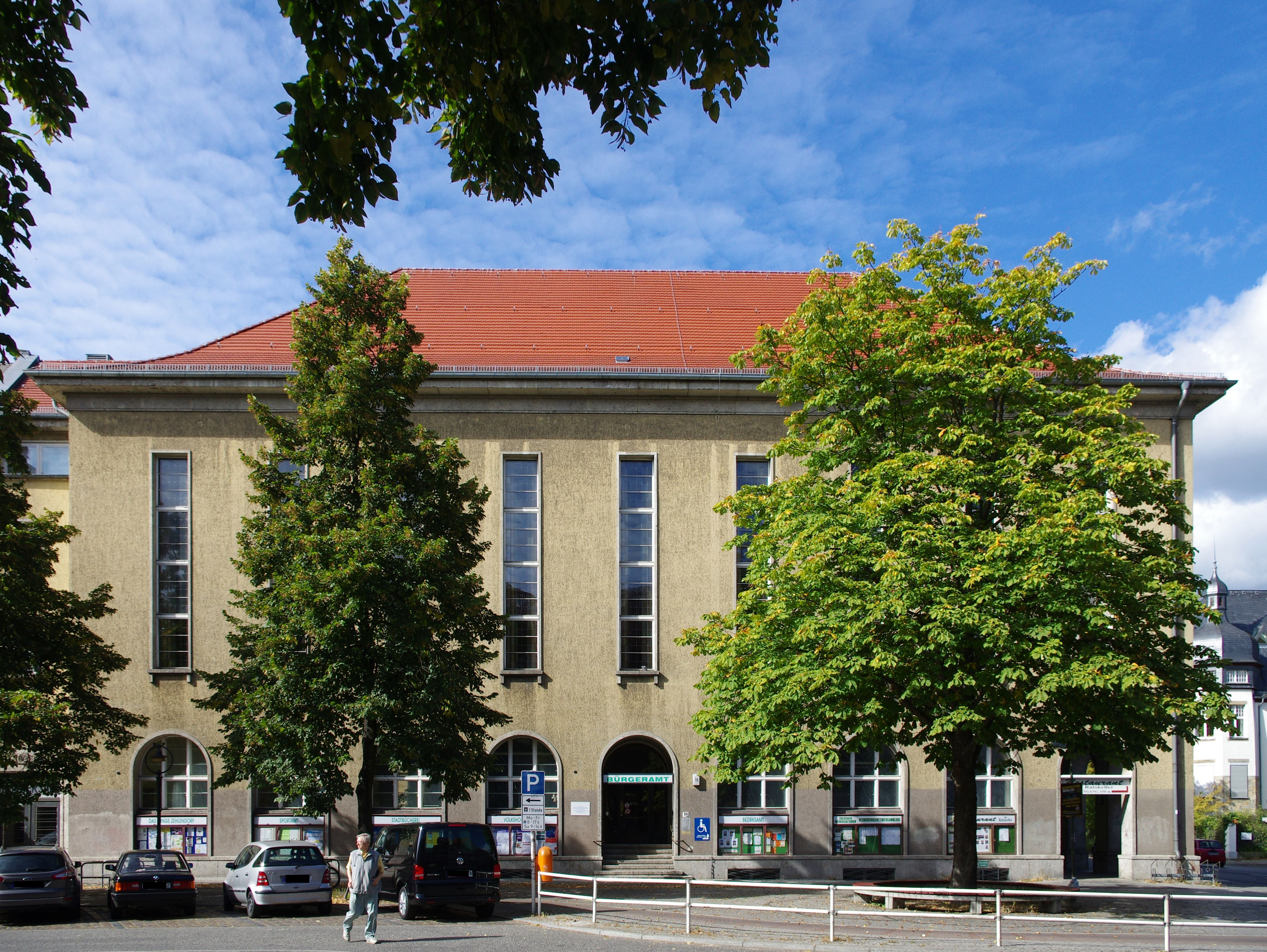 Berlin-Zehlendorf. Das Rathaus wurde 1926–29 von Eduard Jobst Siedler erbaut.